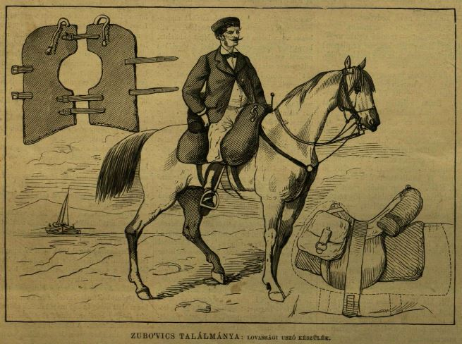 Zubovics találmány: Lovassági úszó készülék. A mi magát az uszókészüléket illeti, ez valami 2 és fél láb hosszú s másfél láb széles fekete kaucsukzsebből vagy hólyagból áll, mely léggel megtöltve két felől a nyereghez van erősítve. E légzacskók alakját rajzunk egyik szögletében külön is megtalálják olvasóink. E két hólyagot hátul a farmatring fölött s elül a nyereg előtt egy-egy szíj köti össze ezek s két pár heveder a ló hasán keresztül kötve elégségesek arra, hogy a lovast lovával együtt a víz színe fölött tartsák s arra is kevés erő szükséges, hogy az úszás irányát a lovas lovának megadja. Á ló teste alig felényire sülyed a vizbe, ugy hogy az egész nyereg, a lovas felső teste, czombjai - szóval térdén fölül minden része a viz fölött marad, ugy hogy tölténytáskáját, lőporát, fegyvereit s más hadszer-készletét a viz el nem ronthatja. A kaucsuk-tömlők, ha nincsenek léggel töltve, a nyeregkápát és farmatringot fedik be és megvédik a nyerget az eső ellen mikor pedig a lovasnak széles és mély folyón kell átúsztatnia, egy perez alatt megtöltheti léggel a tömlőket, csupán csak szájához kell emelnie azt a két hajlékony csövet, mely a tömlők előrészéhez van erősítve és ezt megteheti a nélkül, hogy lováról leszállana vagy pedig azt megállítaná. (Forrás:Vasárnapi Ujság, 1877. április 29.)